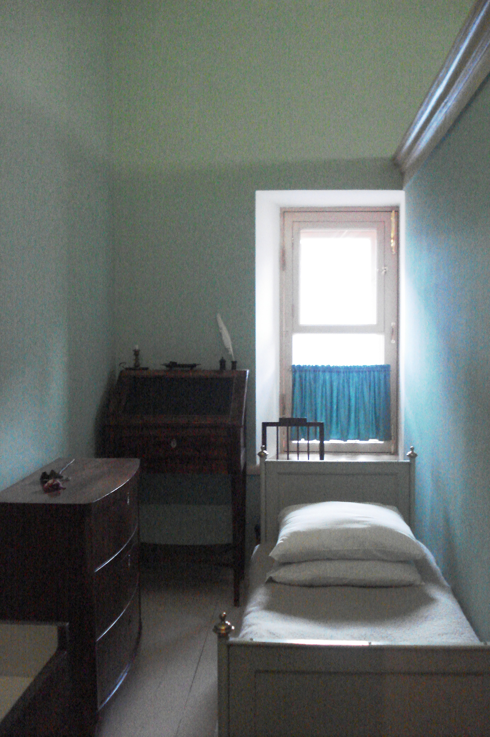 Спальня А.С.Пушкина в Царскосельском лицее